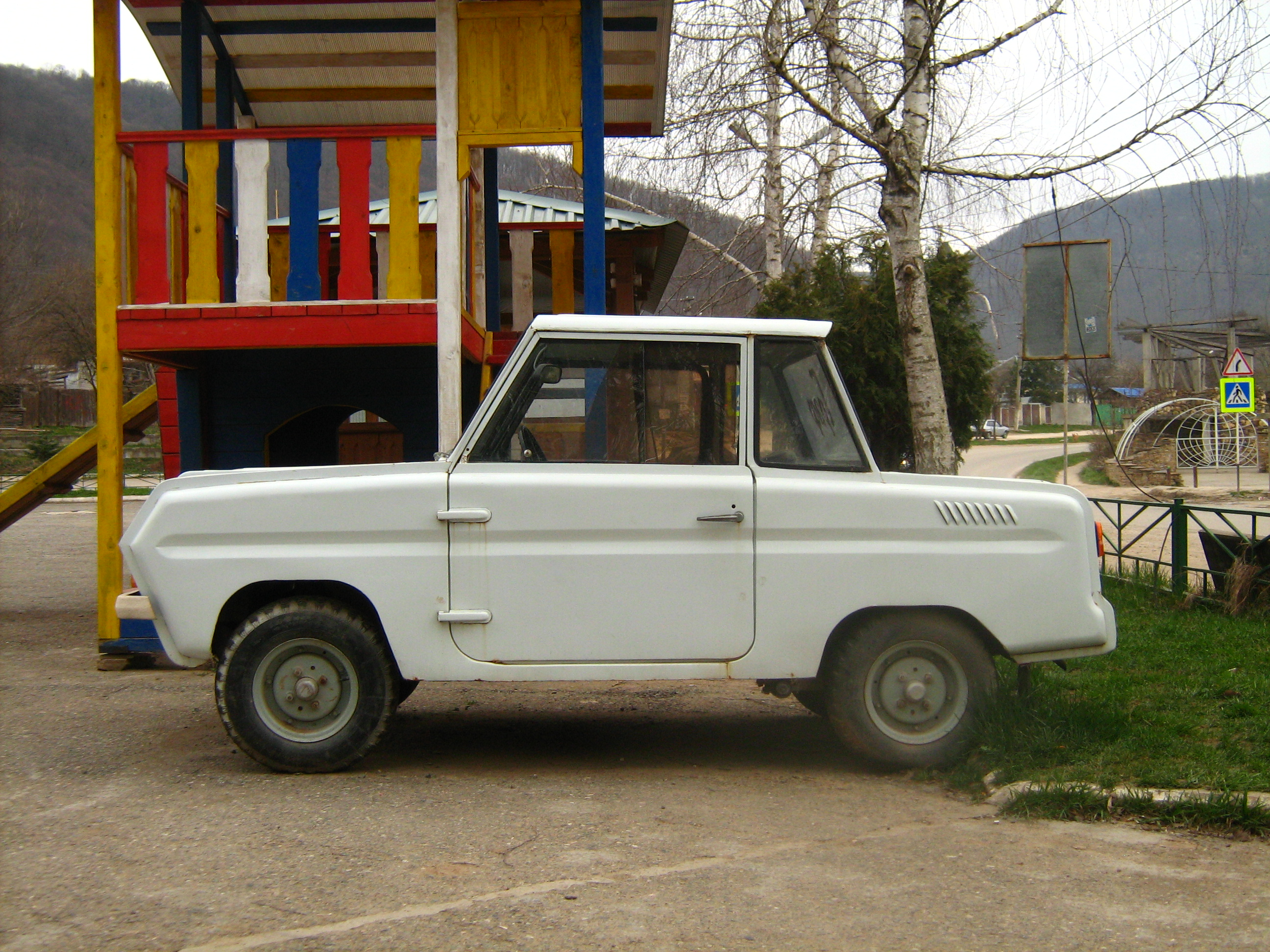 Инвалидная мотоколяска СМЗ-С3Д. Вид сбоку